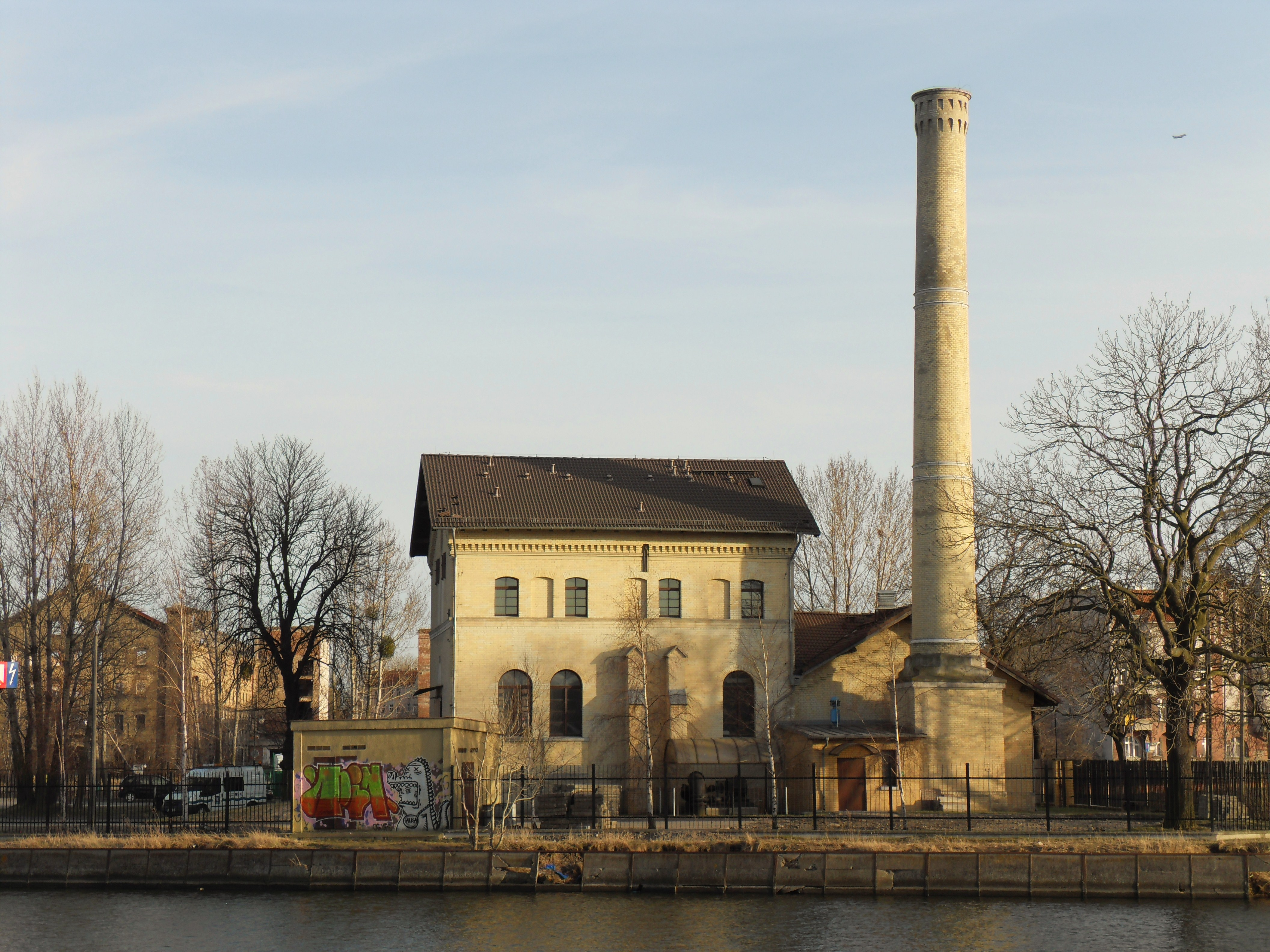 Gdańsk, ul. Ołowianka 4A (przepompownia).